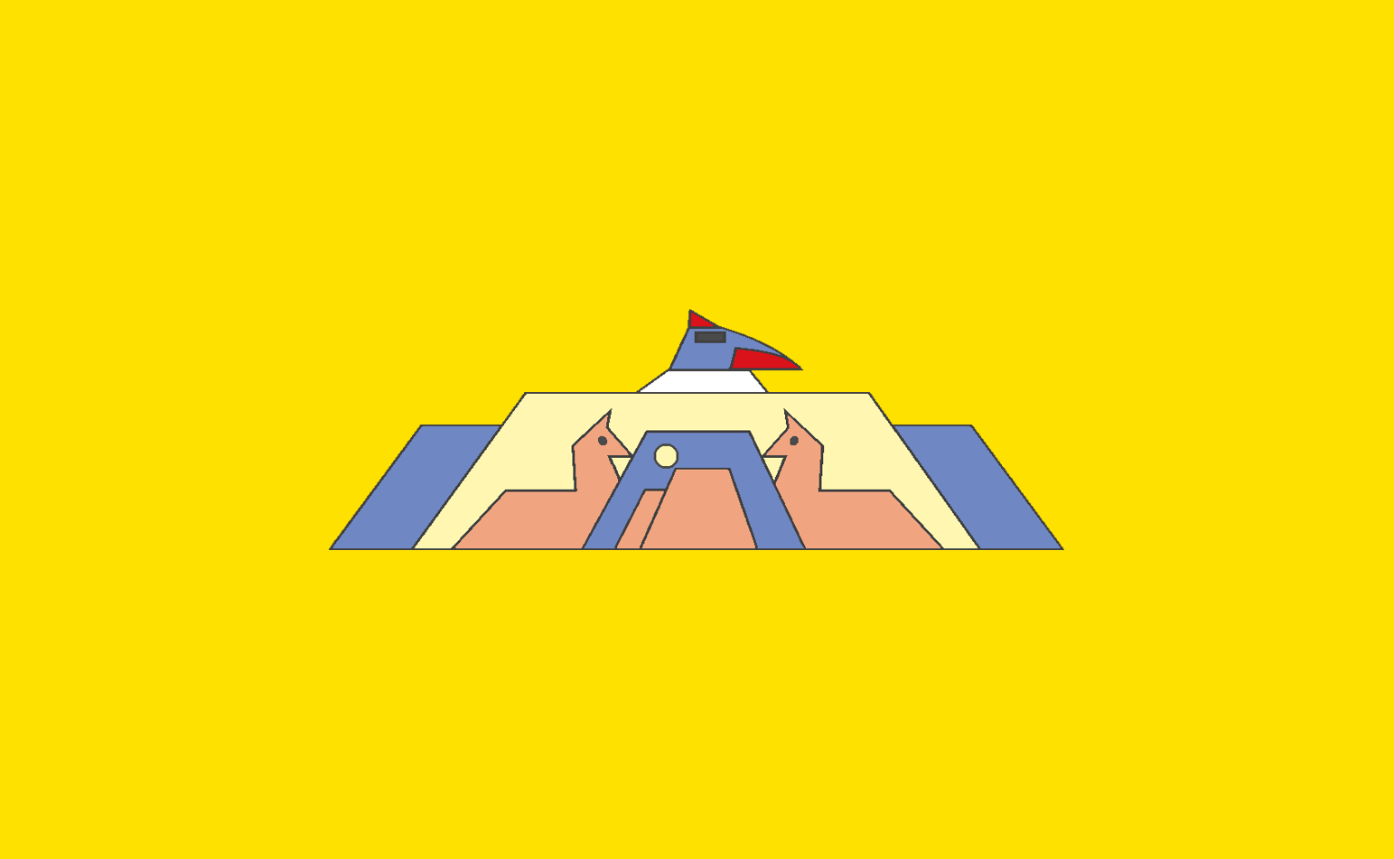 Bandera color amarillo fuerte y en centro el escudo.